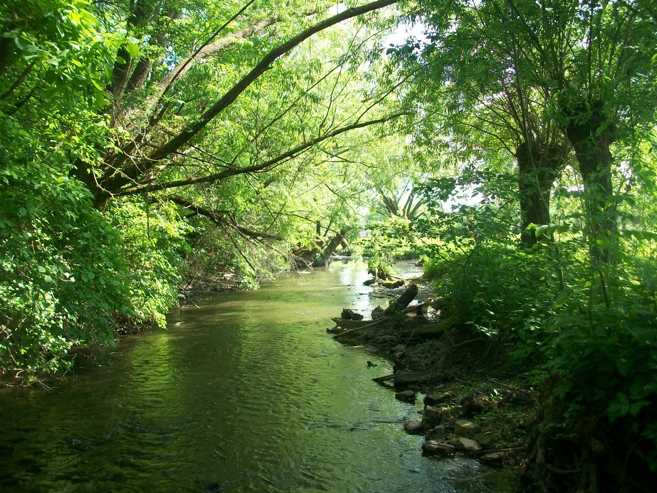 Шманьківці